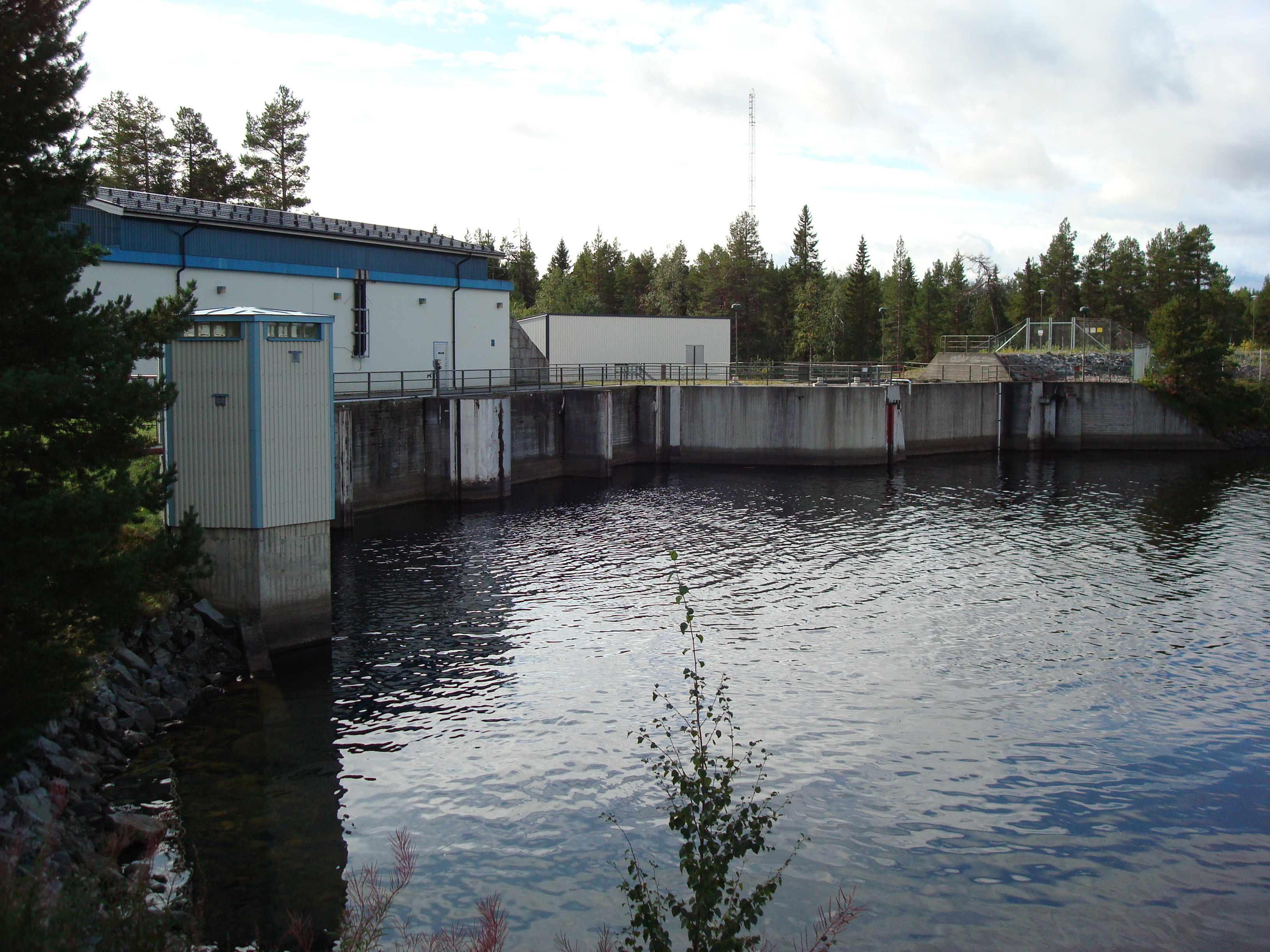 Turbinintaget till Umluspenskraftstation